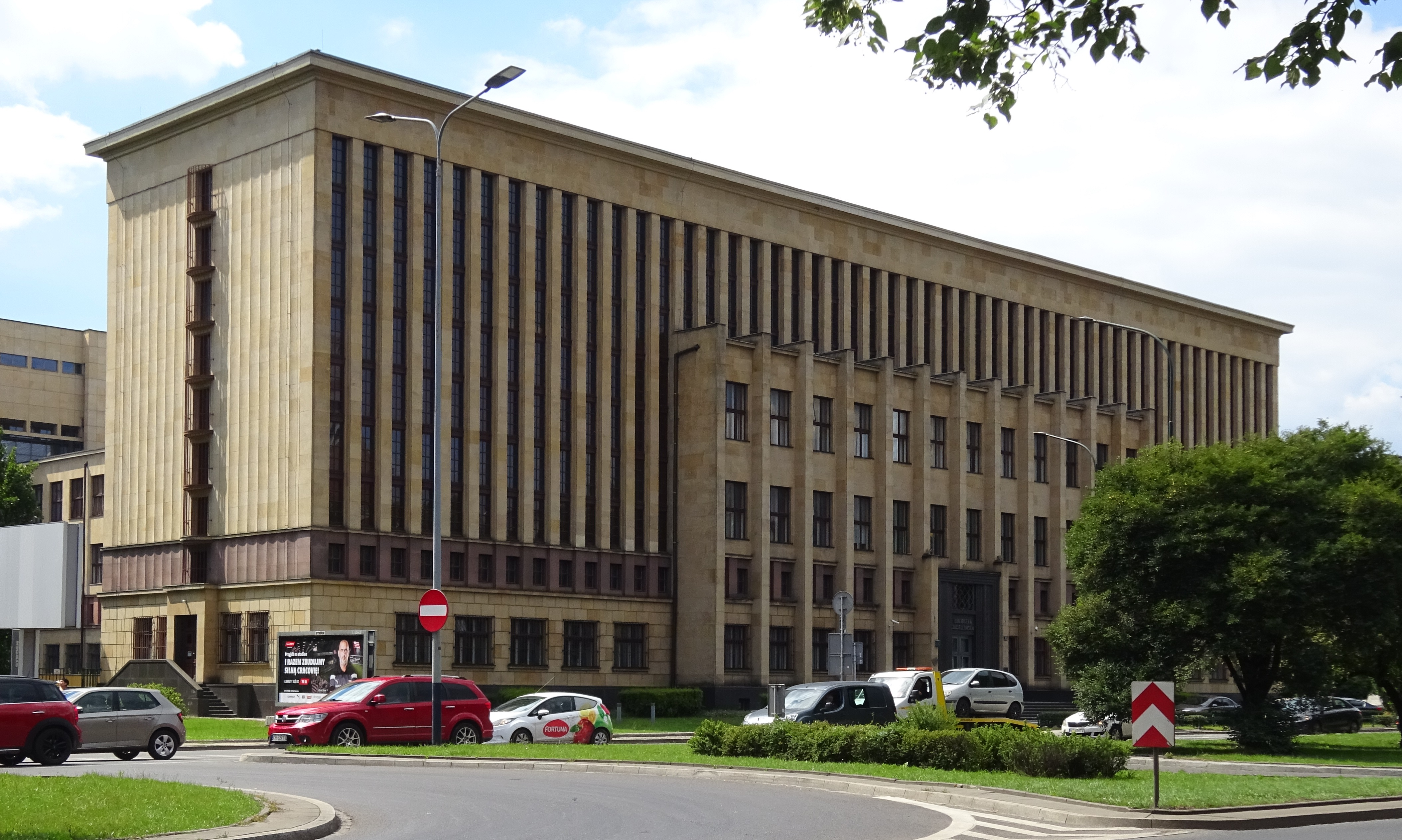 Biblioteka Jagiellońska przy alei Adama Mickiewicza 22 w Krakowie.